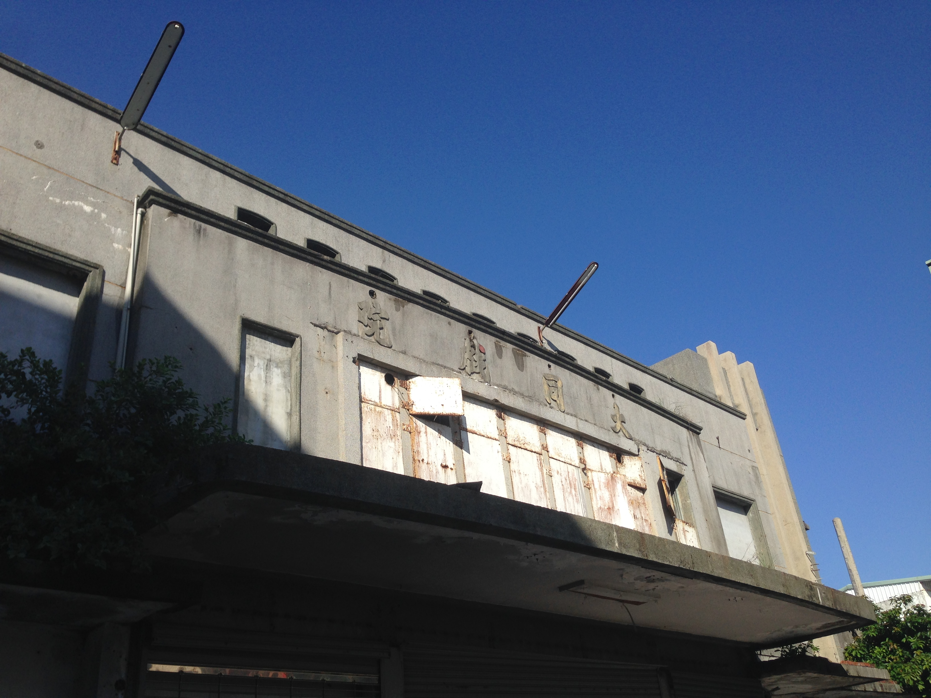 中文（台灣）: 台東大同戲院二樓